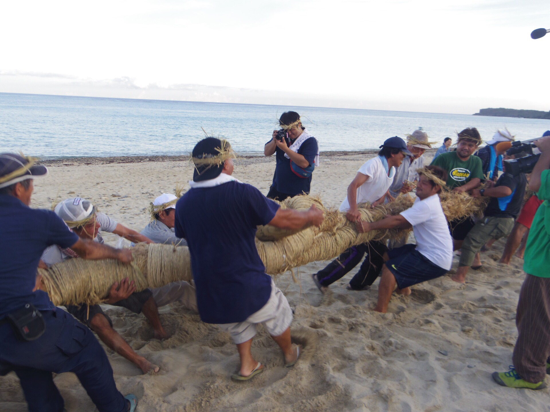 沖縄県名護市嘉陽区の綱引き